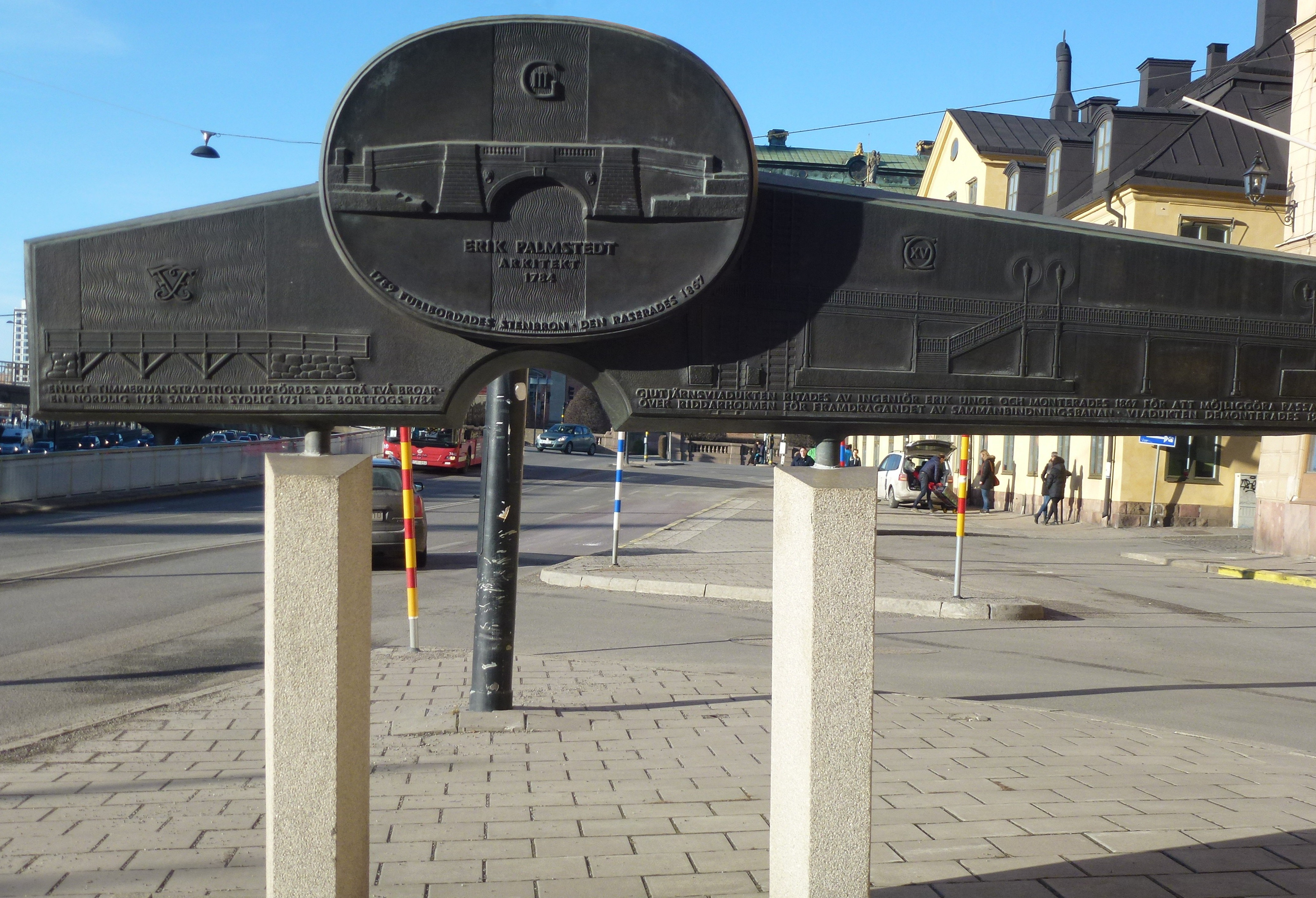 Riddarholmsbroarna av Bengt Inge Lundkvist från 1981